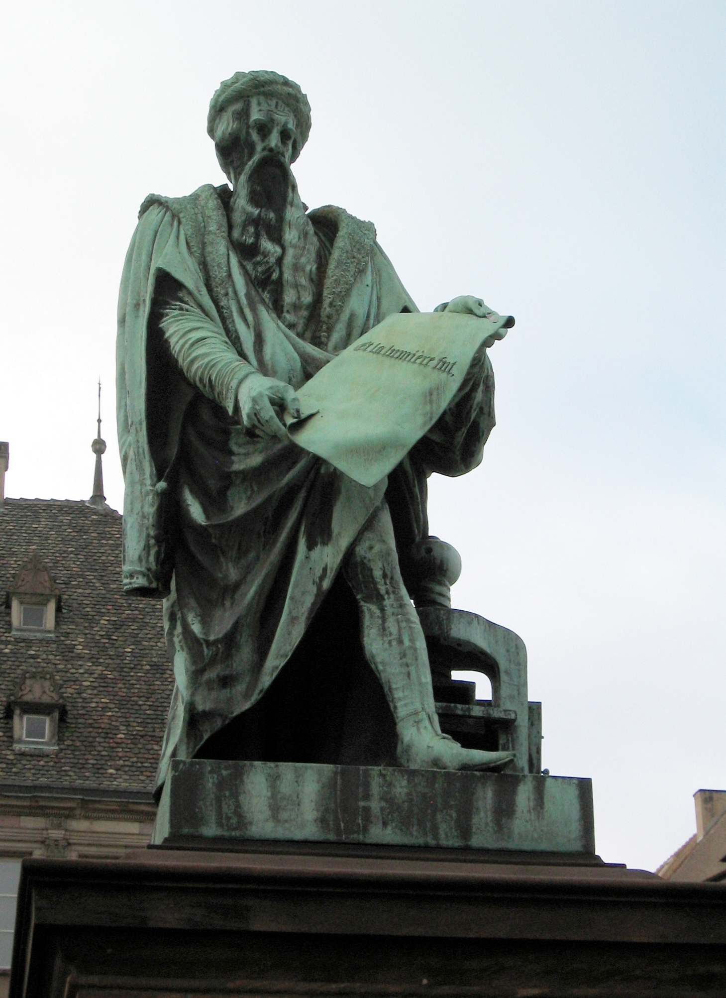 Joe Gutenberg.